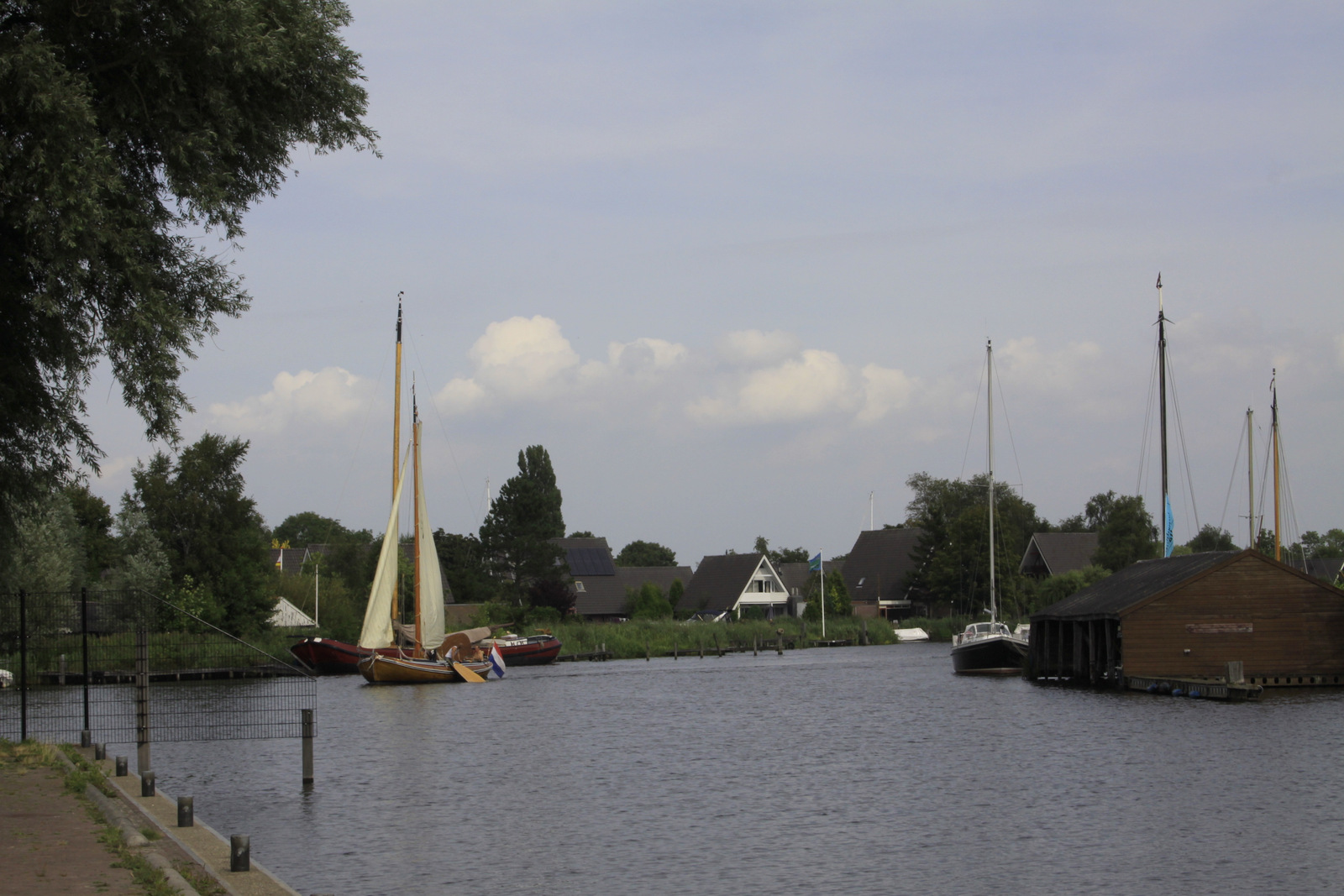 Uitwellingerga aan It Ges.